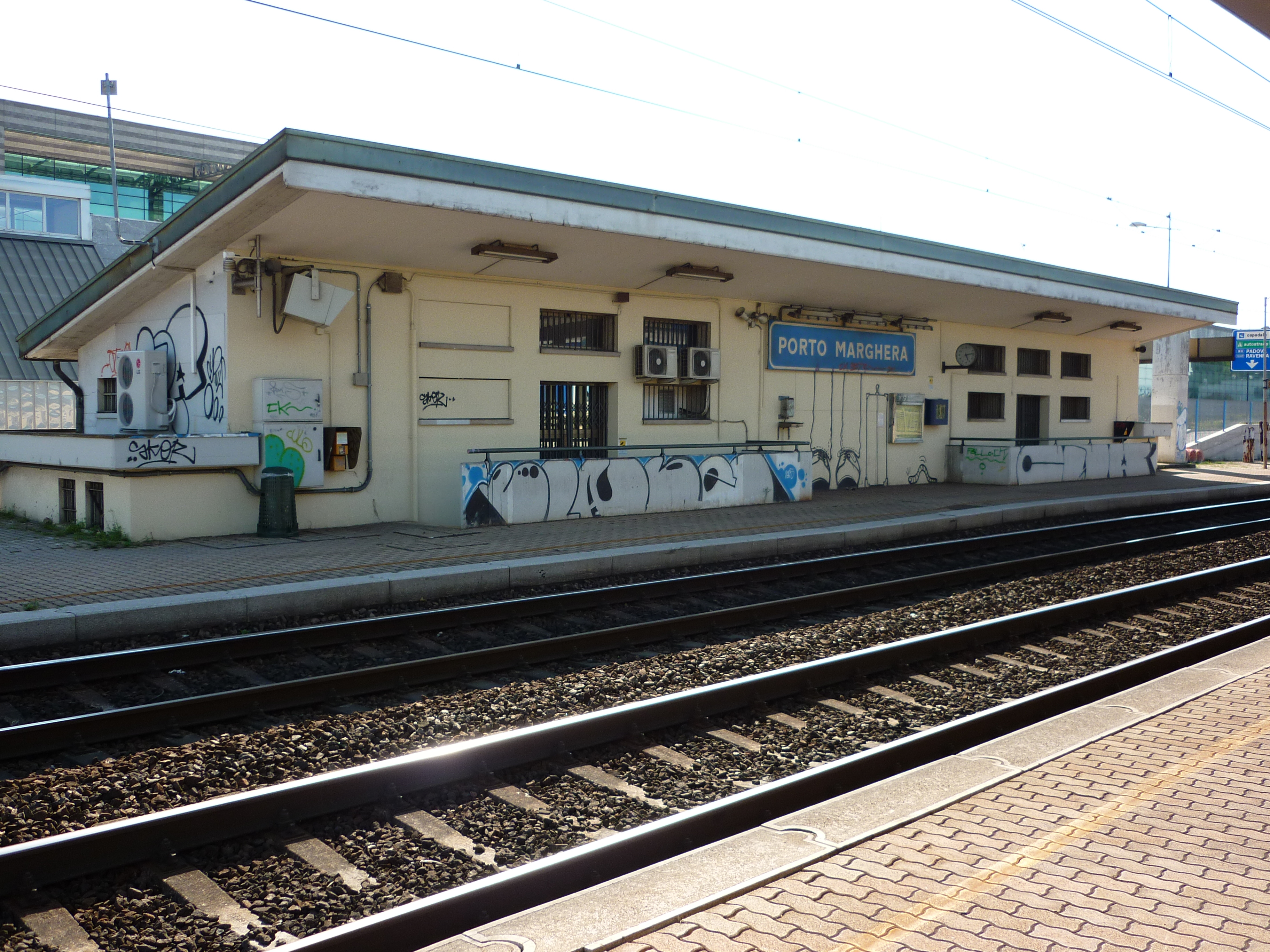 FS